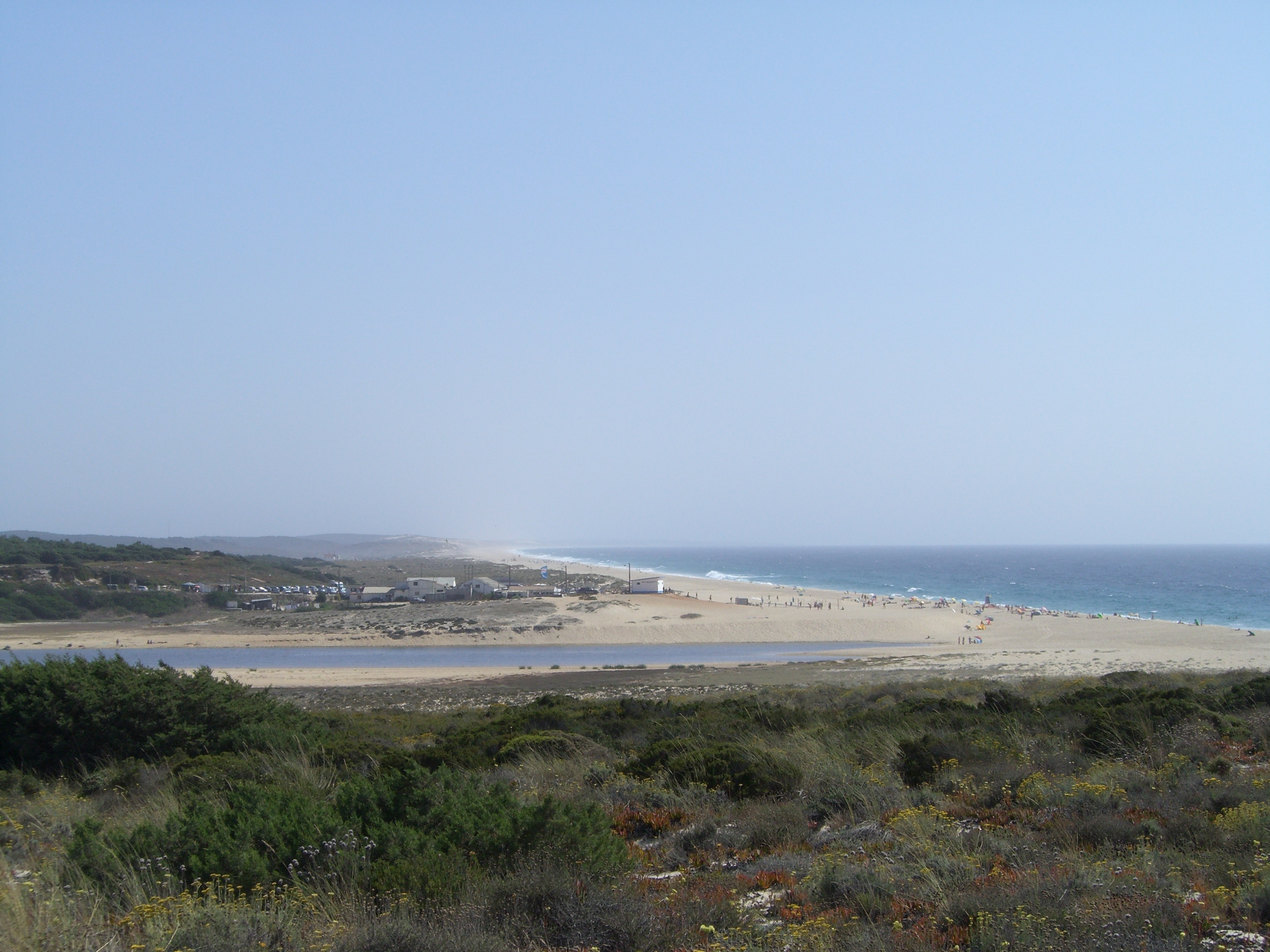 Melides